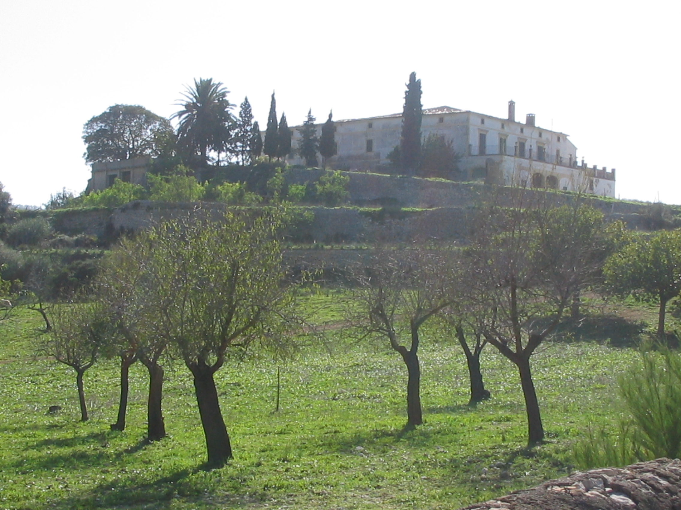 Son_Roig_Calvià_Mallorca